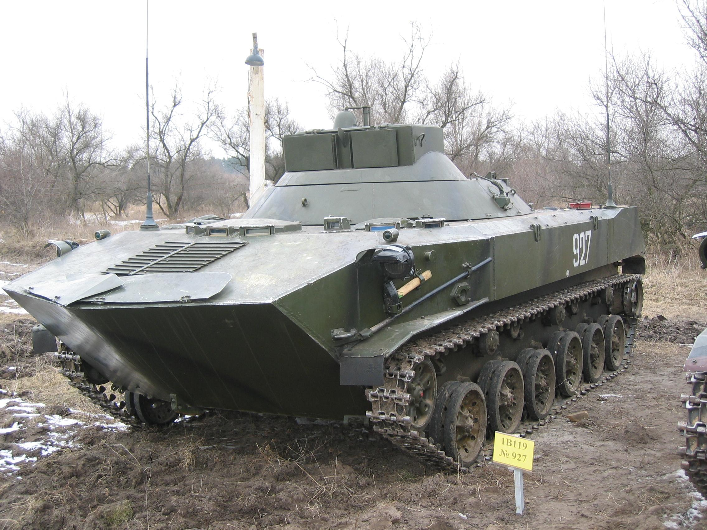 Командний транспорт на базі БМД-1